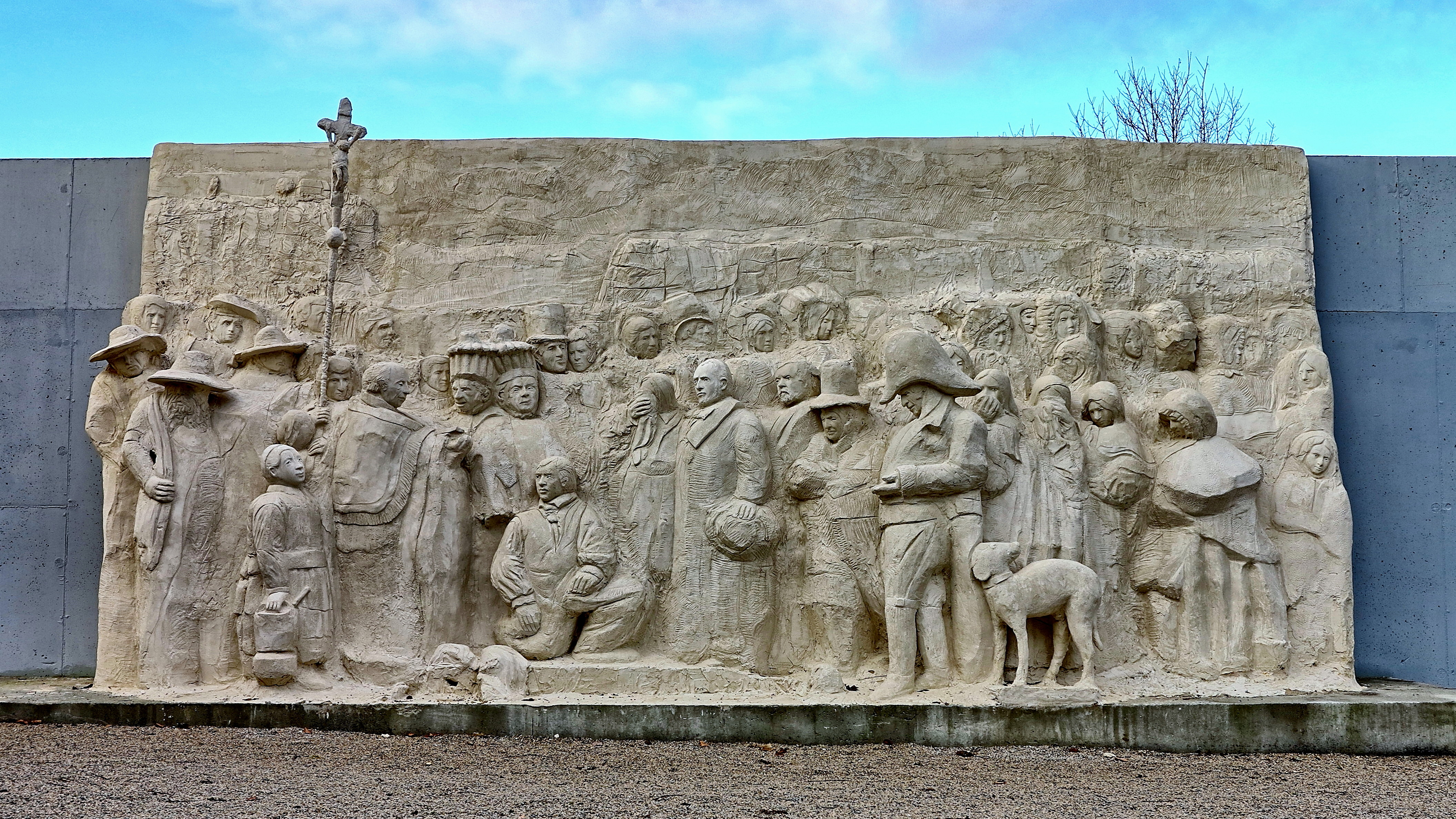 Fresque de Gustave Lafond en hommage à Gustave Courbet (réinterprétation de "l'enterrement à Ornans")